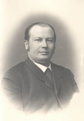 Max Runge